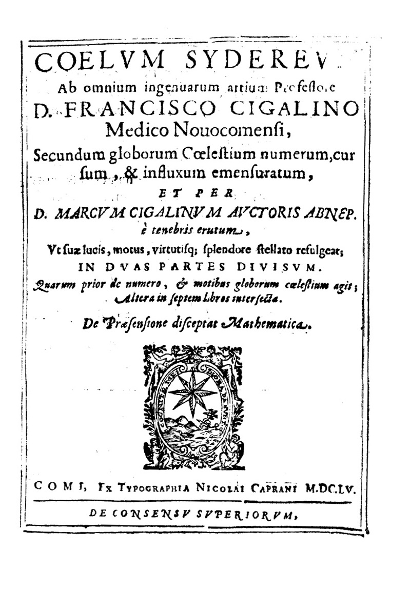 Coelum sydereum ab omnium ingenuarum artium professore d. Francisco Cigalino medico Nouocomensi, secundum globorum coelestium numerum, cursum, & influxum emensuratum, et per d. Marcum Cigalinum auctoris abnep. e tenebris erutum, vt suae lucis, motus, virtutisque splendore stellato refulgeat; in duas partes diuisum. Quarum prior de numero, & motibus globorum coelestium agit; altera in septem libros intersecta, de praesensione disceptat mathematica. - Comi : ex typographia Nicolai Caprani, 1655. - [12], 488, 102, [2] p. ; 4º. - Nell'esemplare digitalizzato le due pt. sono invertite, cosicché la paginazione è [12]. 102, [2], 488 .